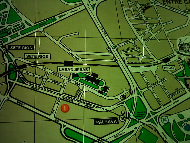 Antigos apeadeiros da Linha de Cintura: Laranjeiras e Rego (Lisboa), em mapa editado pela CML em 1983 (mapa ainda em uso em 2009).